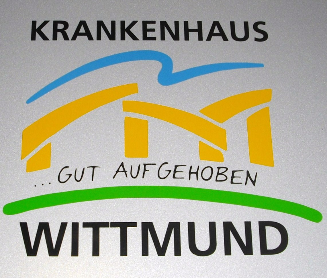 Logo des Krankenhauses Wittmund